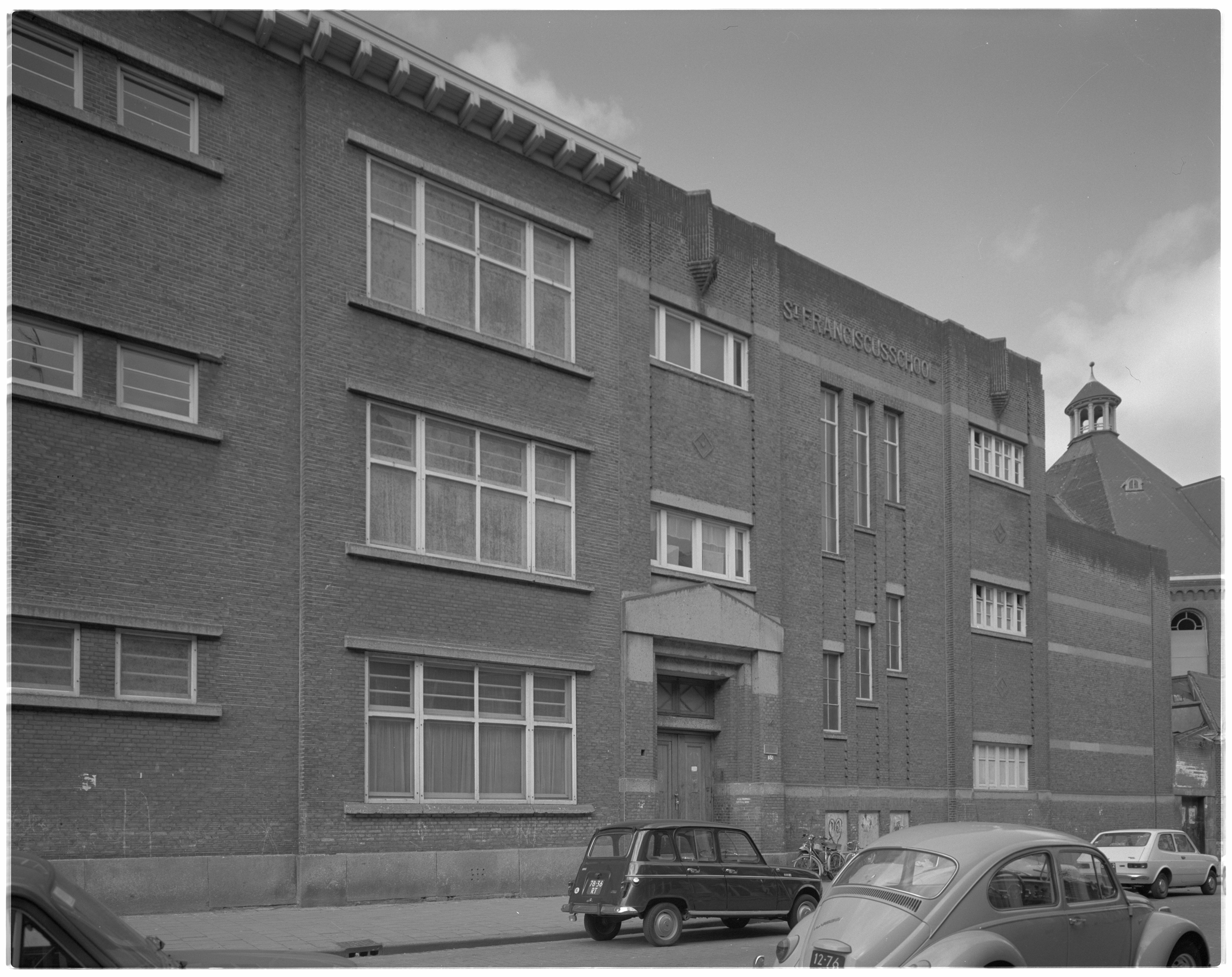 De Sint Franciscusschool in de Christiaan de Wetstraat (nr. 35). Nummer: 13547-1 Titel: Sint-Franciscusschool Beschrijving: De Sint Franciscusschool in de Christiaan de Wetstraat (nr. 35). Datering: 13-07-1975 - 15-07-1975 Toegangsnummer: 4121 Collectie: Collectie Ary Groeneveld Vervaardiger: (fotograaf): Ary (A.) Groeneveld Auteursrechthouder: Gemeente Rotterdam (Stadsarchief) CC-0 Auteursrechtelijk beschermd: Nee Documentsoort: Fotografisch document Downloadbaar: Ja